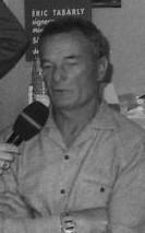 Éric Tabarly, marin français